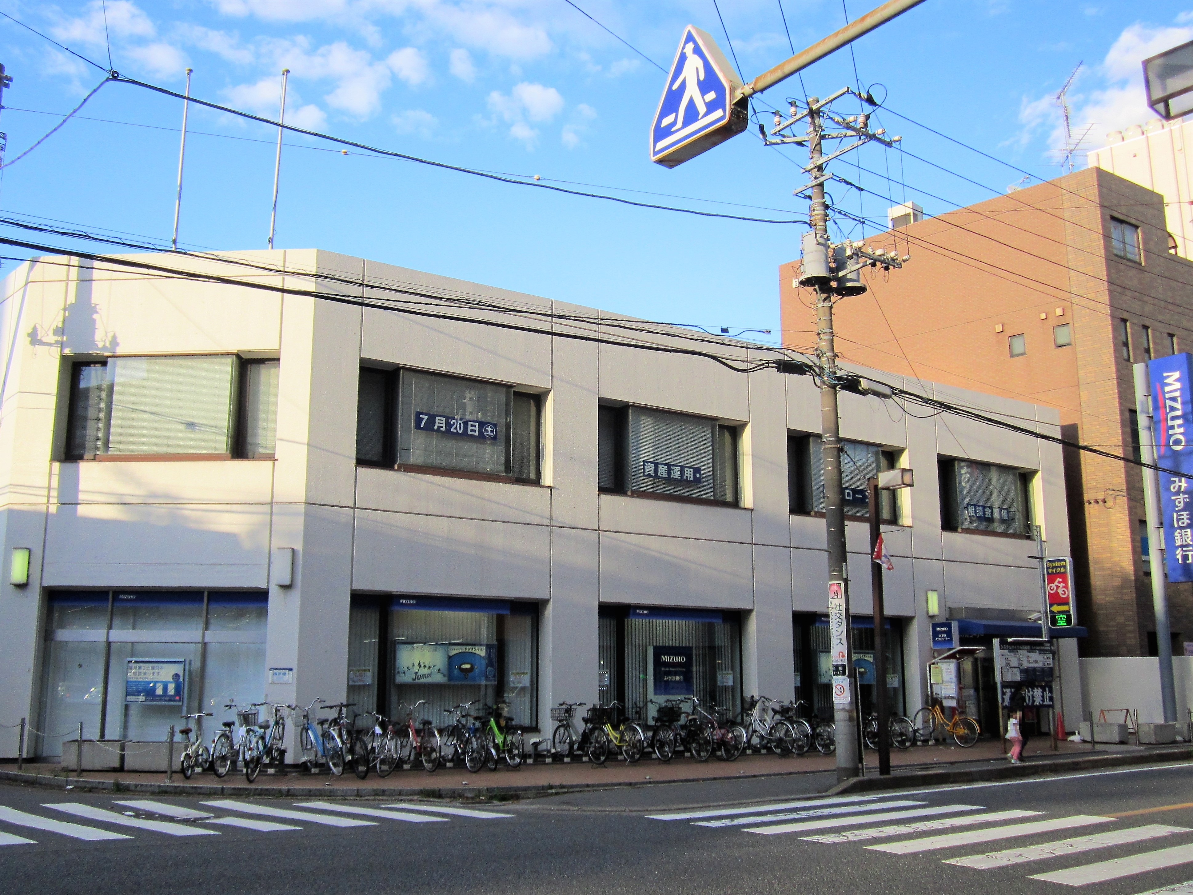 みずほ銀行西船橋支店（船橋市西船）